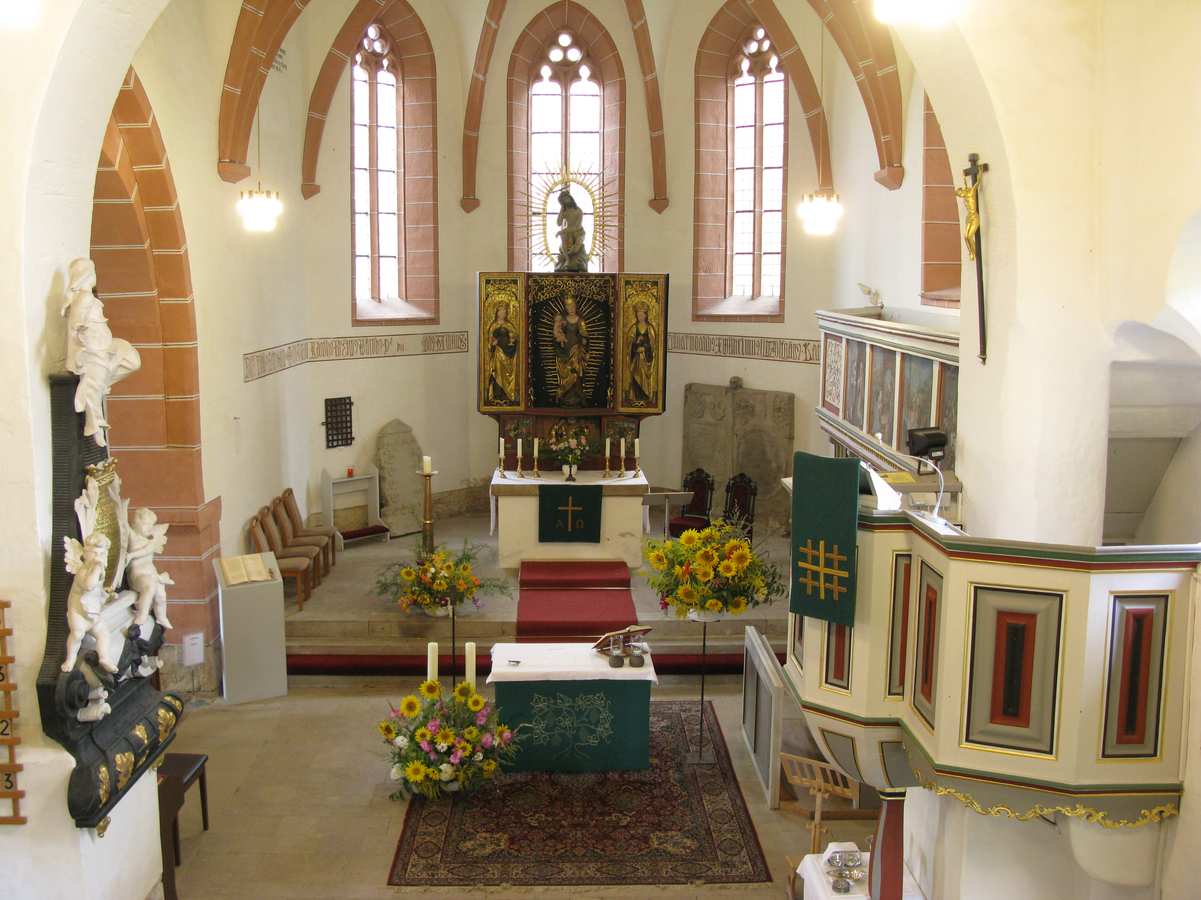 Innenansicht der Pfarrkirche St. Veit in Wünschendorf/Elster (Ortsteil Veitsberg)